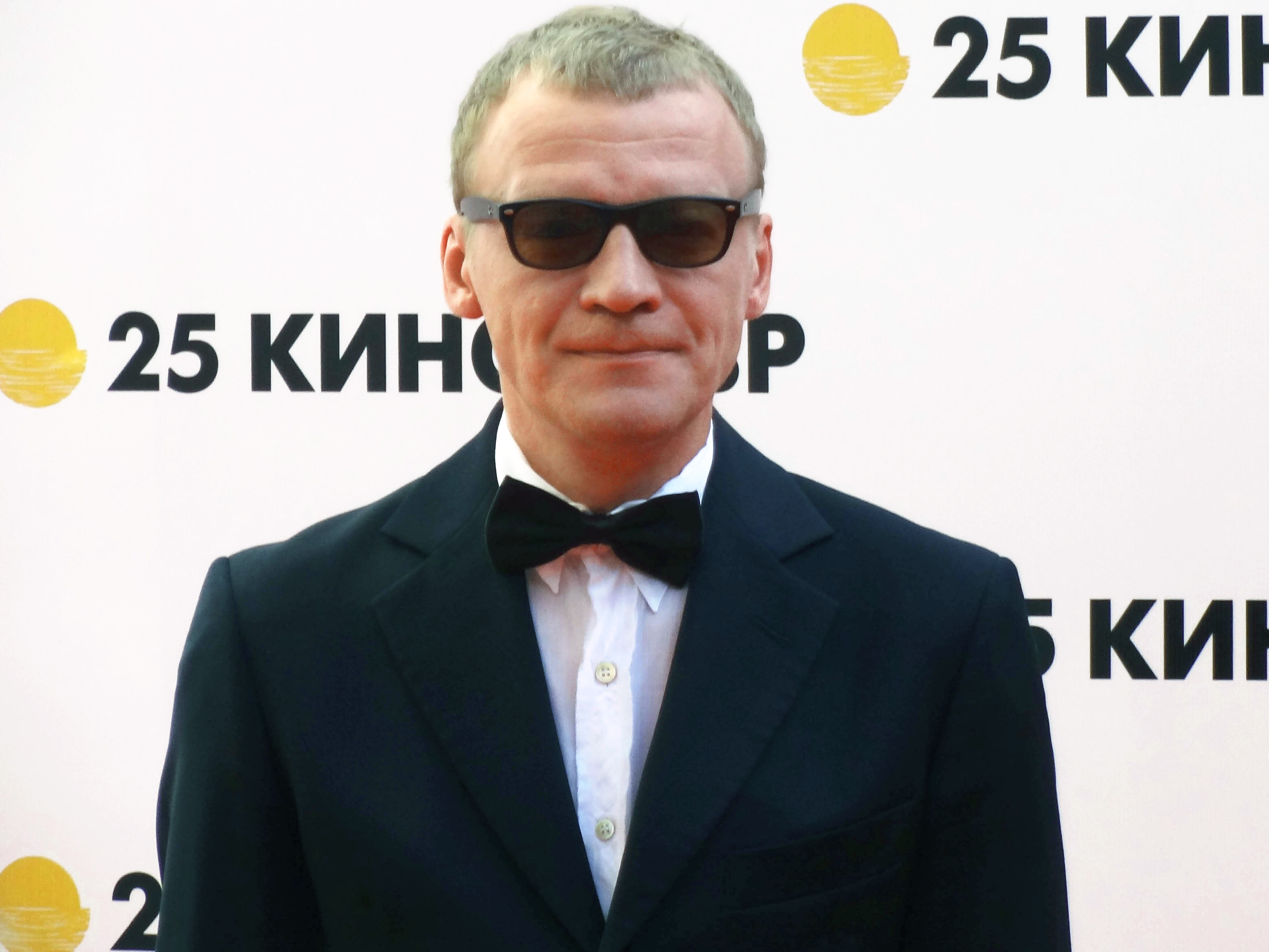 Алексе́й Вале́рьевич Серебряко́в (род. 3 июля 1964, Москва) в Сочи, 2014. Кинотавр.